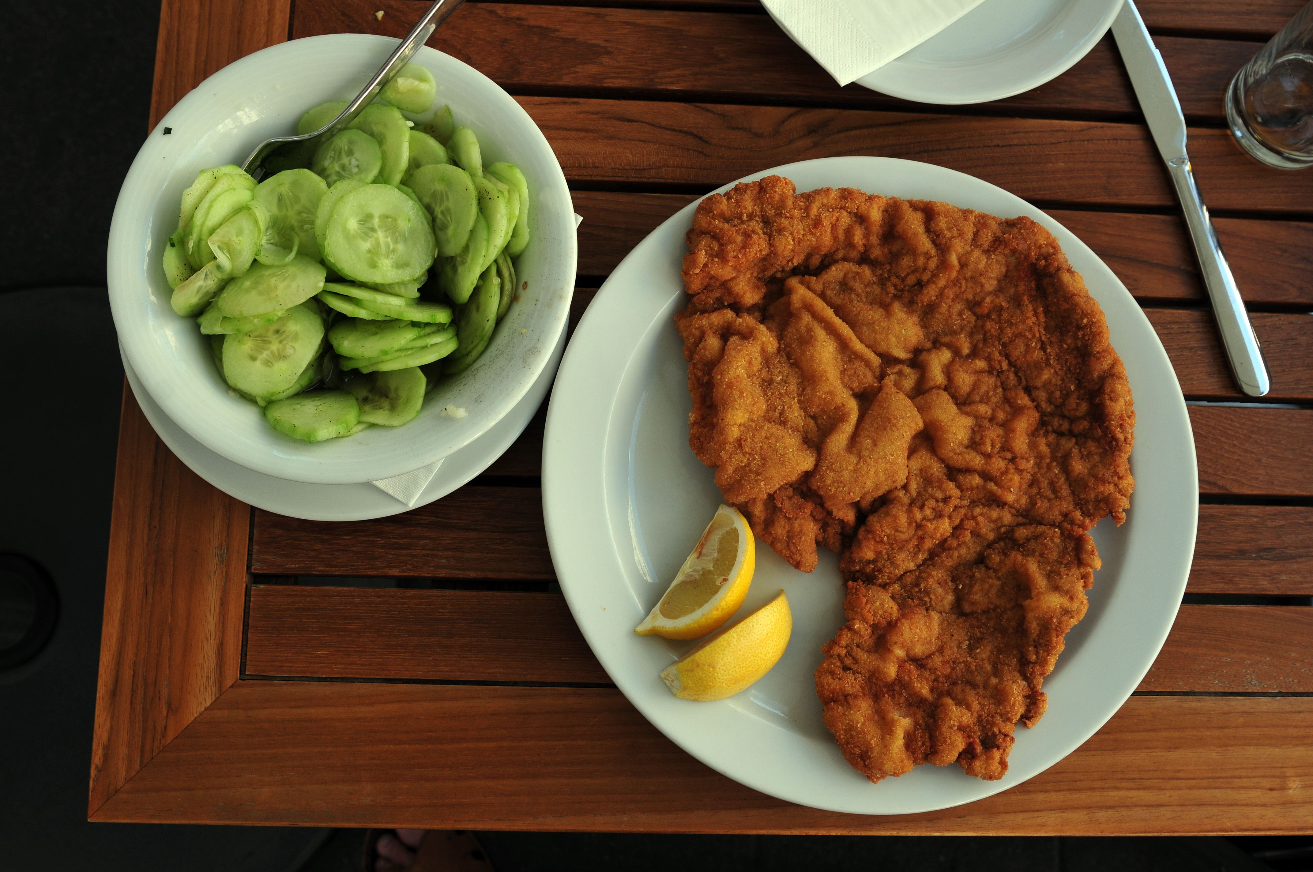 Treffen der Redaktion Essen und Trinken ion Wien